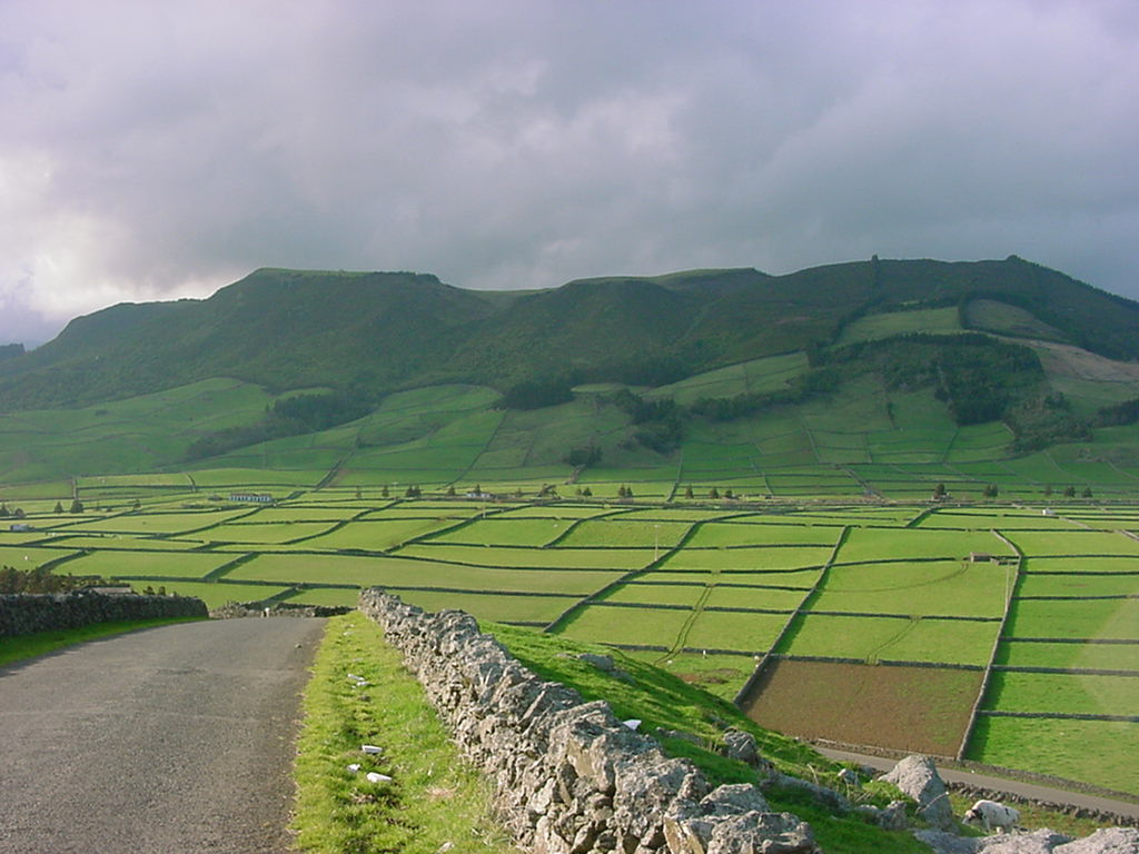 Serra do Morião ou da Nasce Água, ilha terceira, Açores, Portugal.